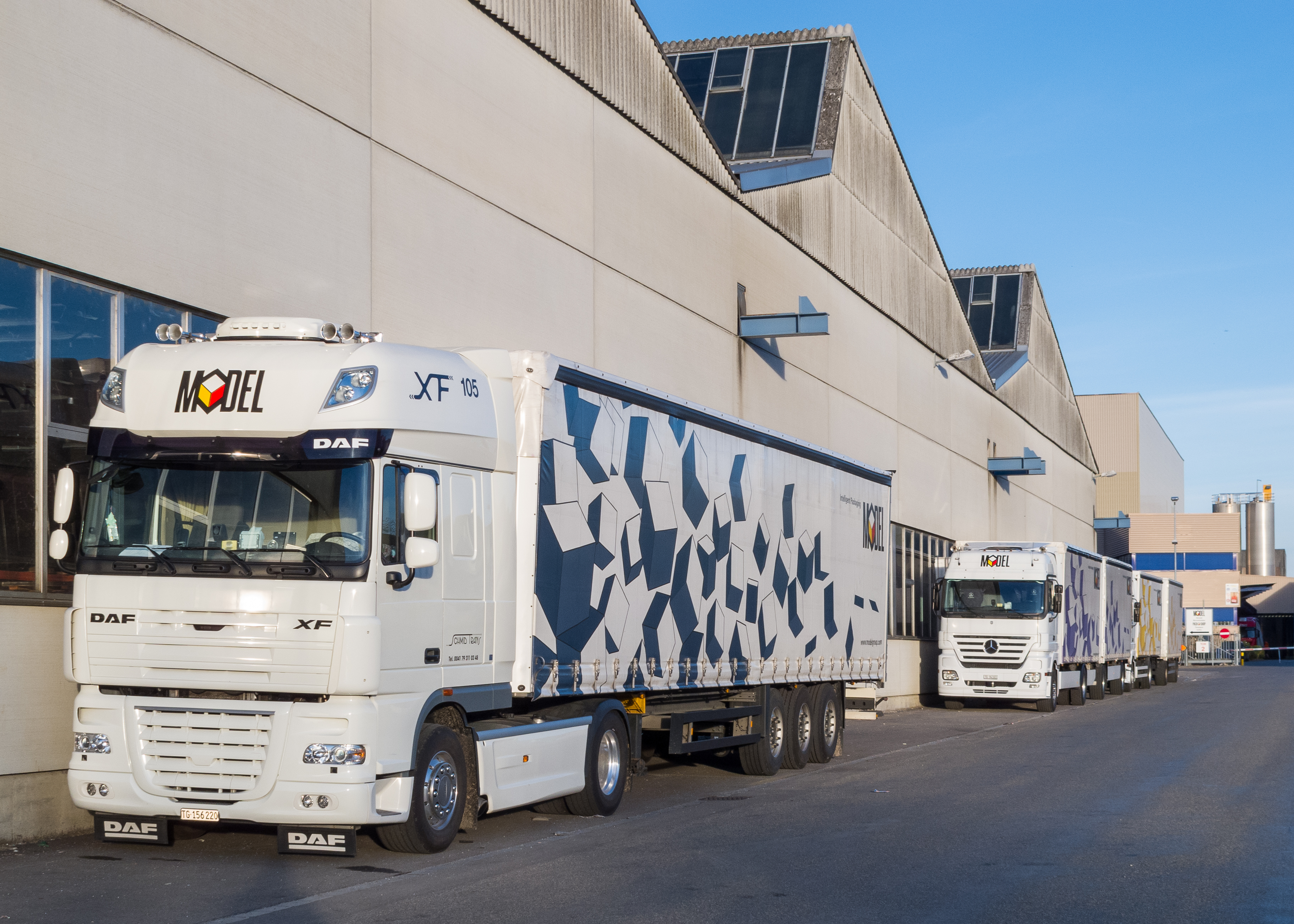 Lastwagen am Weinfelder Werk der Model Holding AG